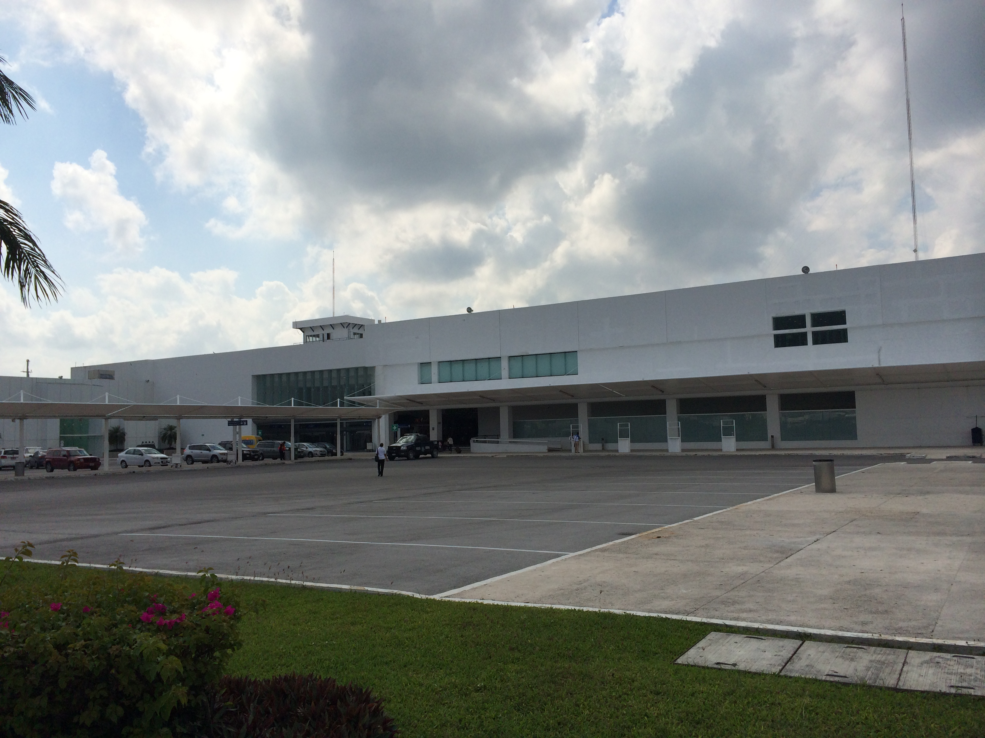 Lado Tierra de la terminal 1 de CUN.